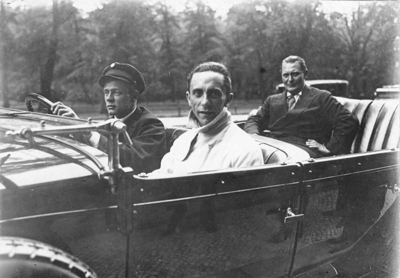 Die Eröffnung des Reichstages. Der Einzug der Nationalsozialisten in den Reichstag in Berlin Die Führer der Berliner Nationalsozialisten, die Abgeordneten Dr. Goebbels (vorn im Auto), dahinter sitzend Hauptmann Göring, begeben sich zur Eröffnungs des Reichstages.